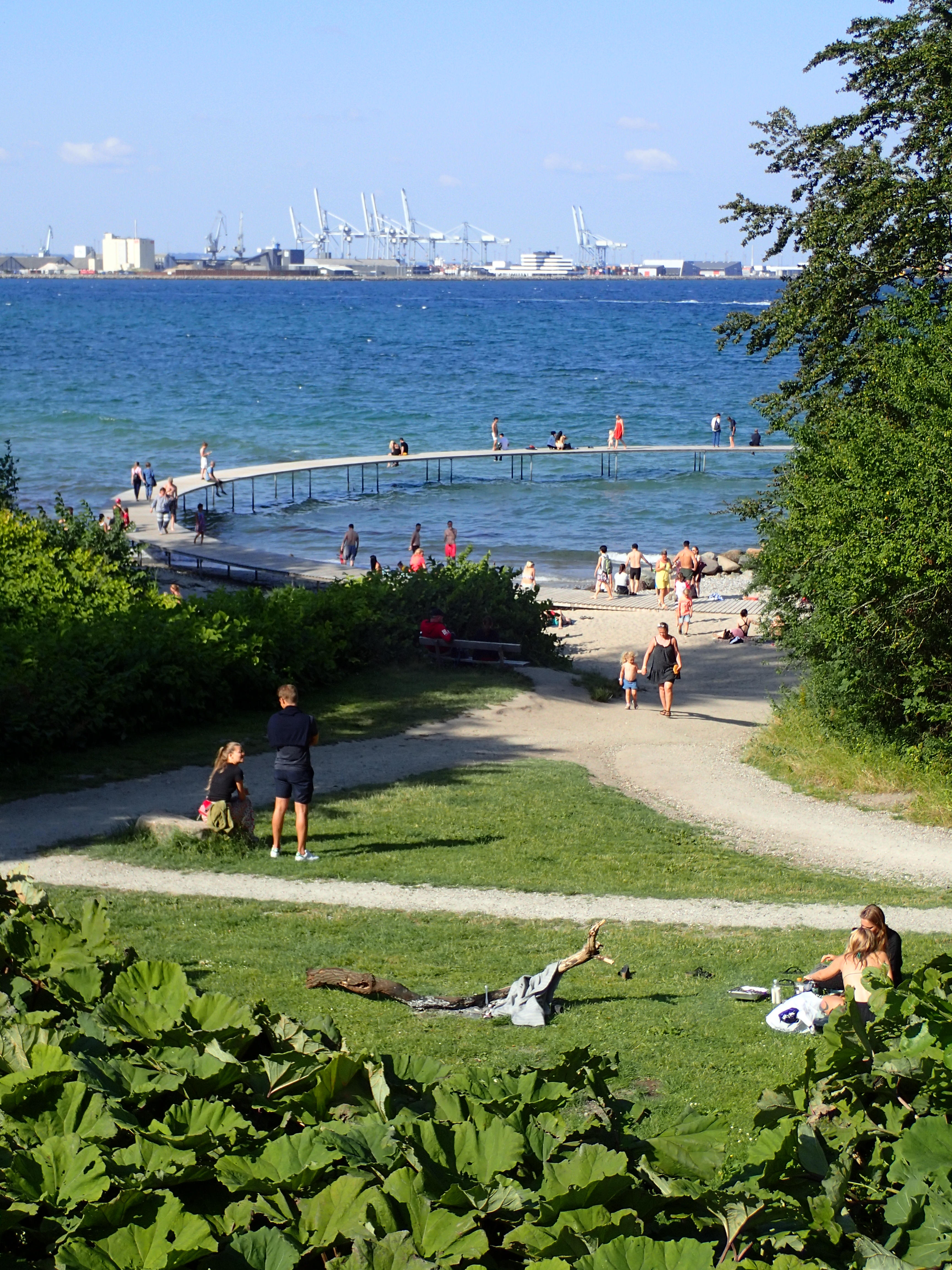 Den Uendelige Bro. Juli måned.